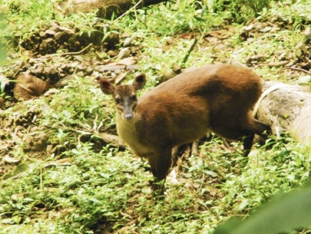 Cabro de monte (Mazama temama) fotografiado en el Parque Nacional Tapantí, Costa Rica.